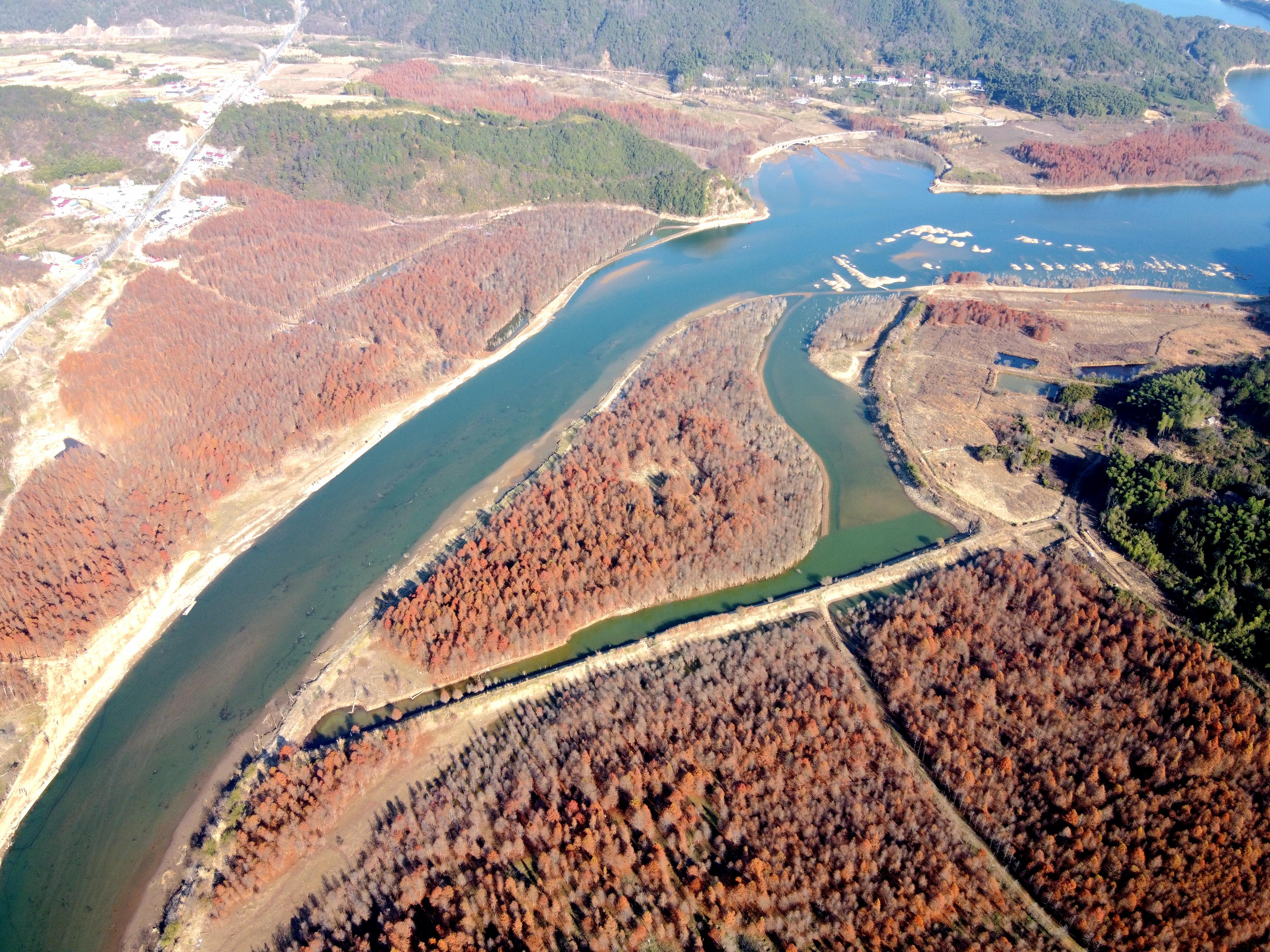 高空俯瞰宣城宁国青龙湾落羽杉林